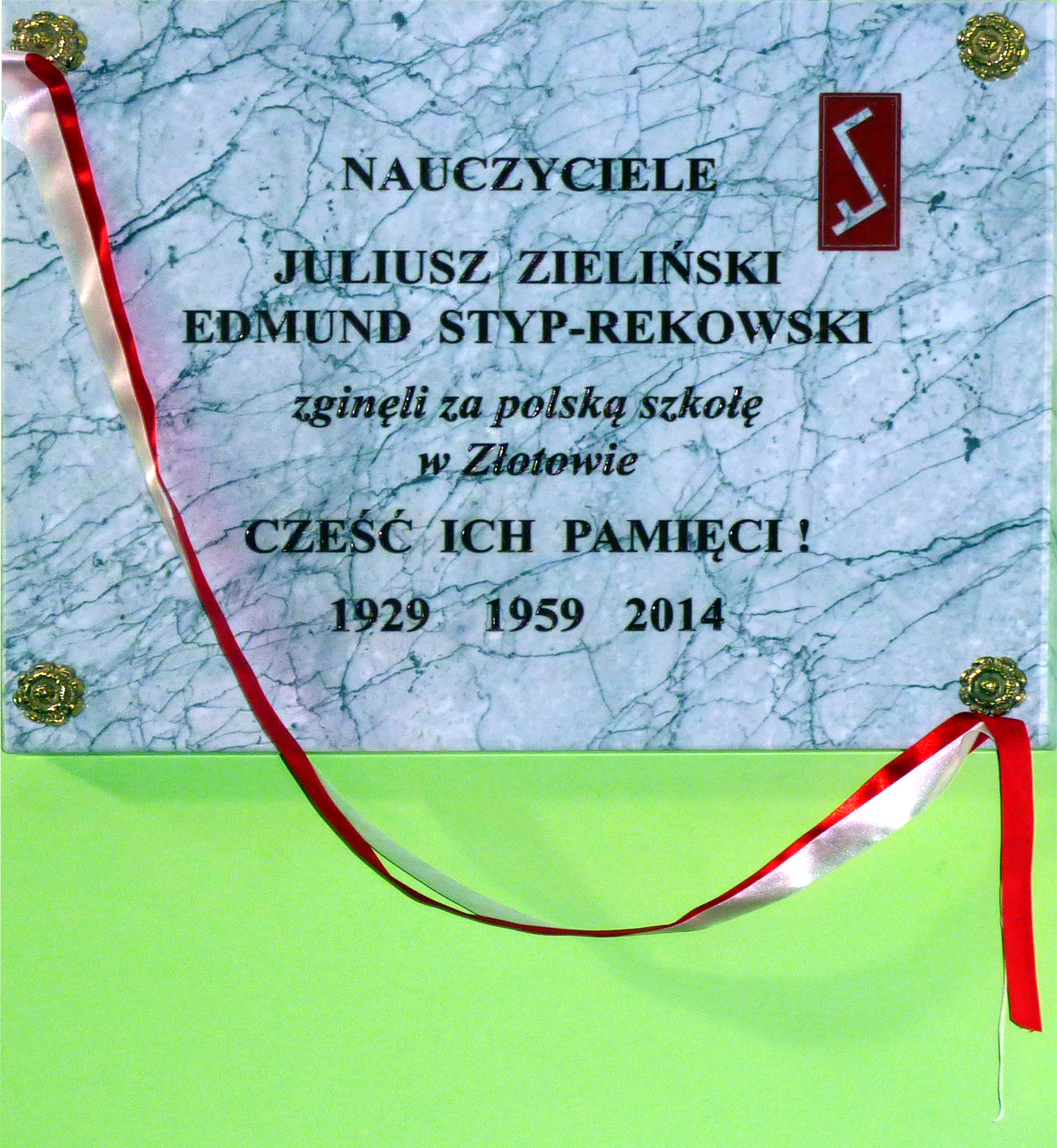 Tablica pamiątkowa wmurowana w Szkole Podstawowej nr 1 w Złotowie. Zastąpiła ona inną, wmurowaną tu w 1959 roku, w 30. rocznicę utworzenia w Złotowie szkoły polskiej (na tej pierwszej była błędna forma imienia nauczyciela Juliusza Zielińskiego).